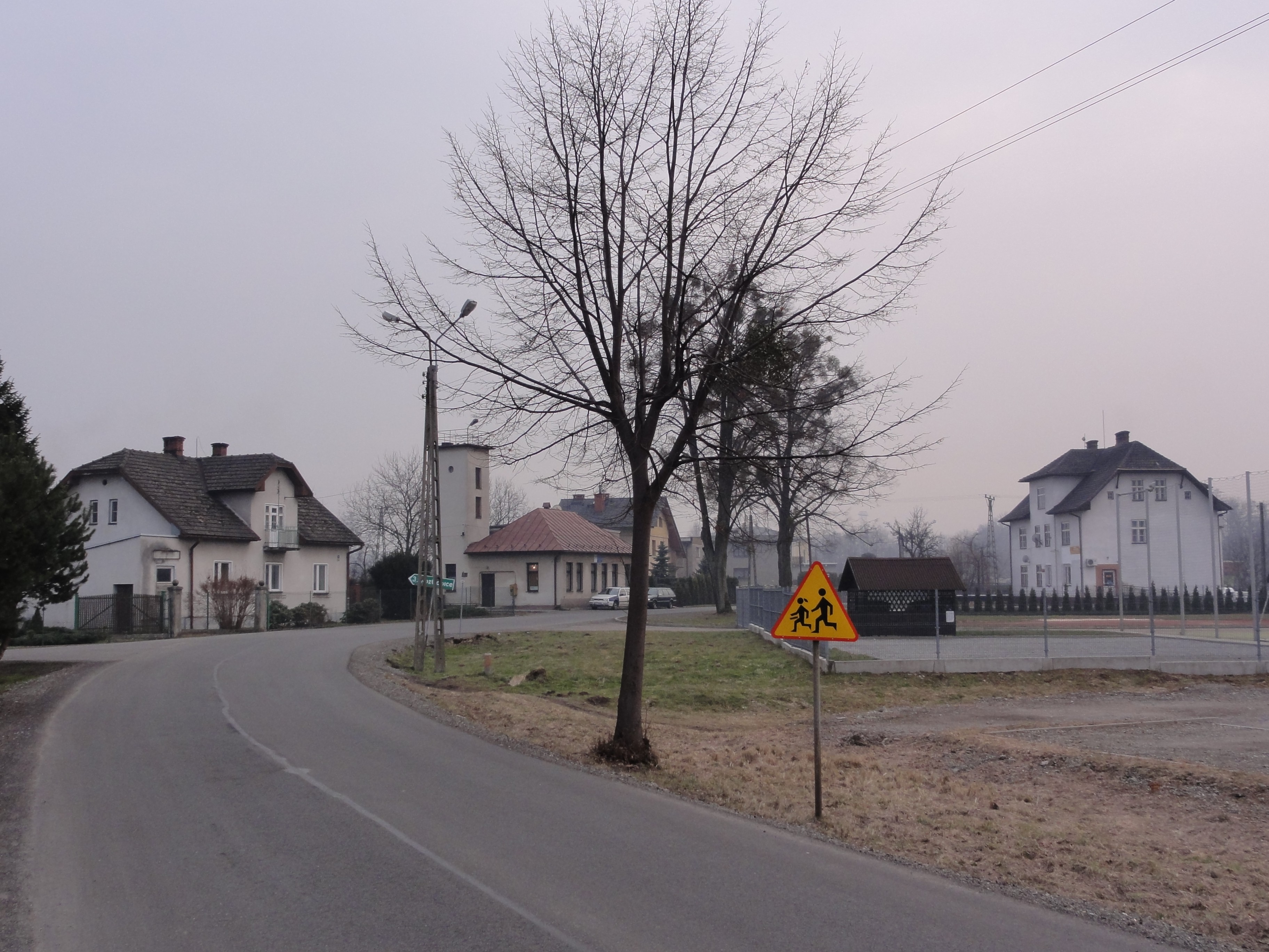 Centrum Pierśćca